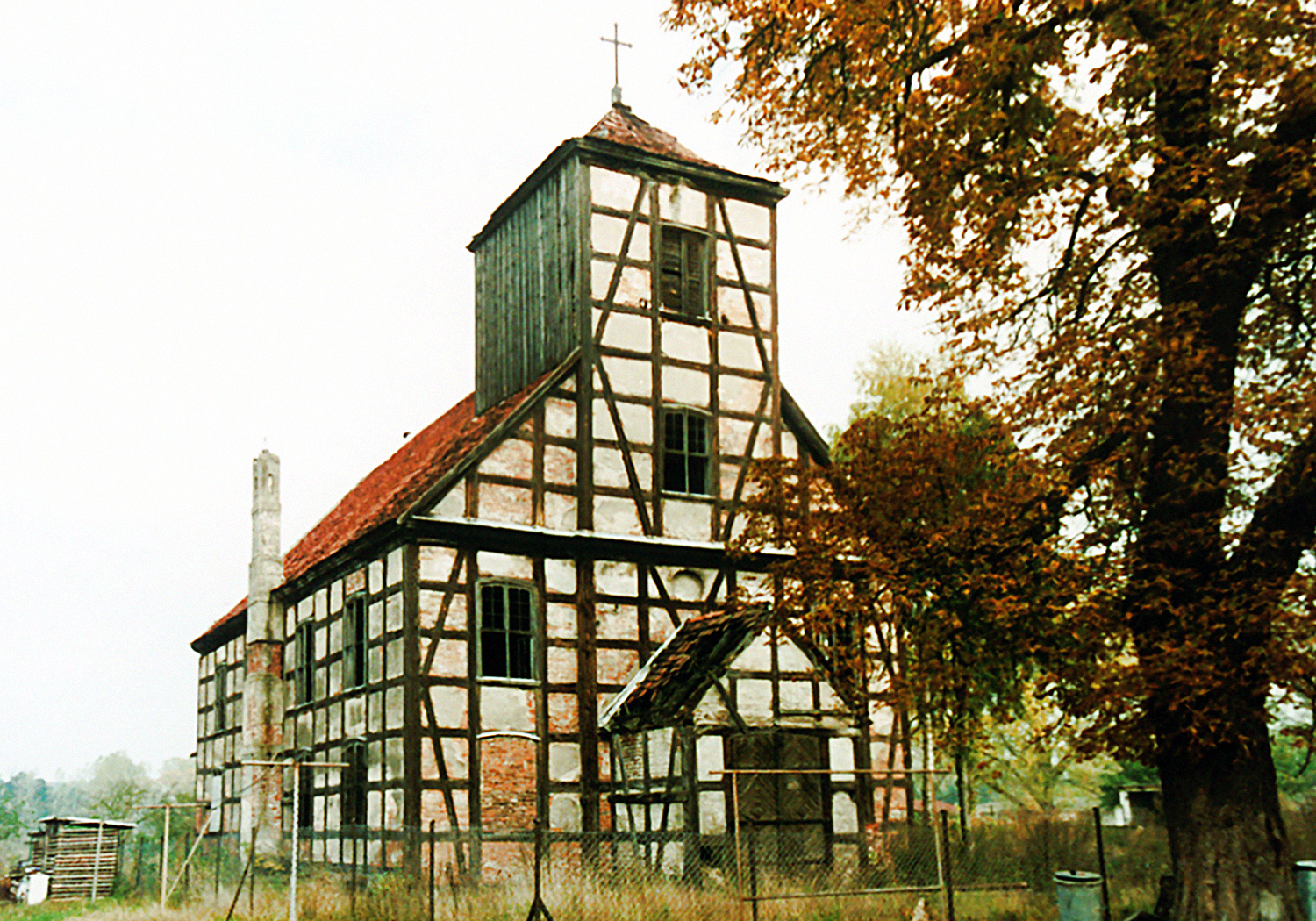 Sieraków, dawny kościół ewangelicki (former evangelical Church)